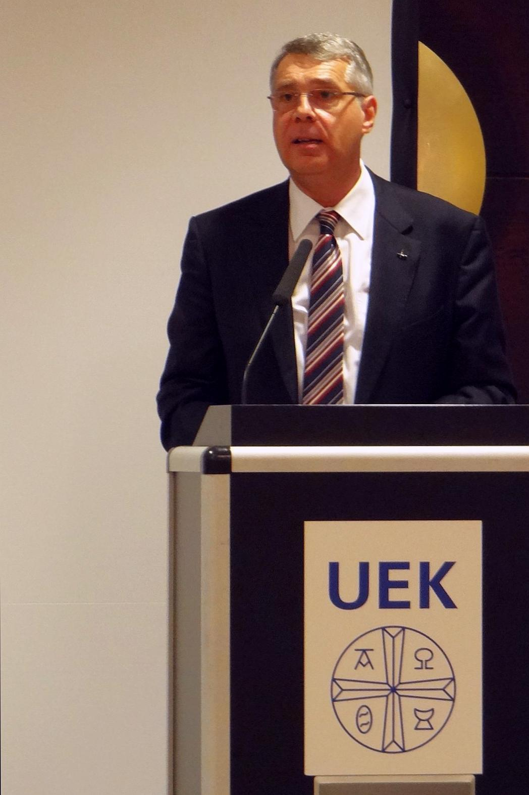 Der pfälzische Kirchenpräsident Christian Schad bei seiner Vorstellungsrede zur Wahl des Vorsitzenden der UEK-Vollkonferenz, Düsseldorf 2013